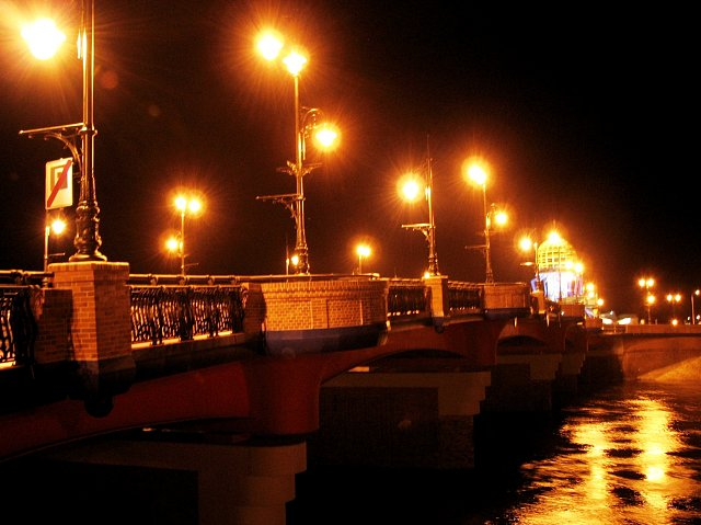 Most staromiejski w Gorzowie Wielkopolskim nocą